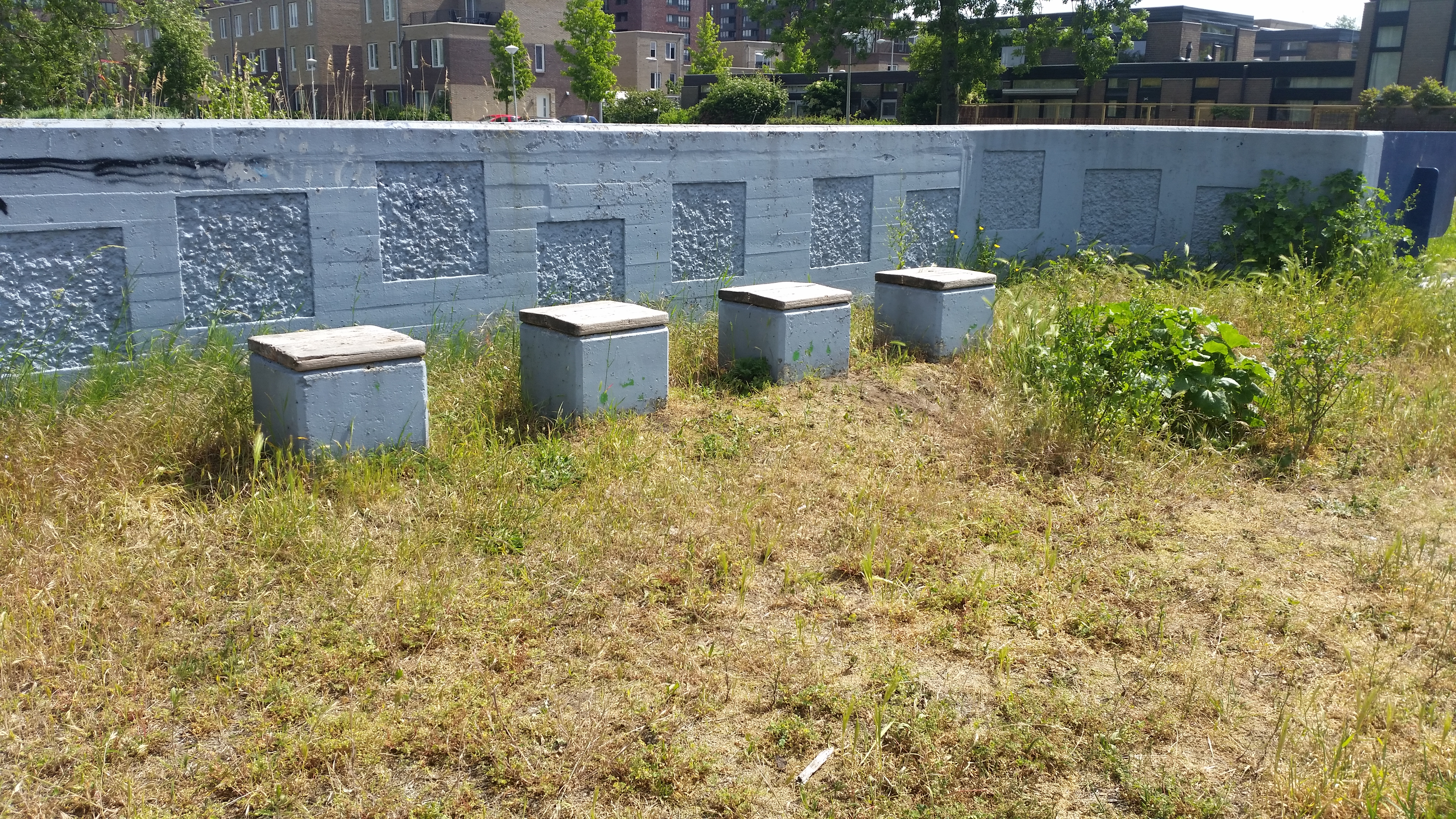 Brug 904 (in Amsterdam)